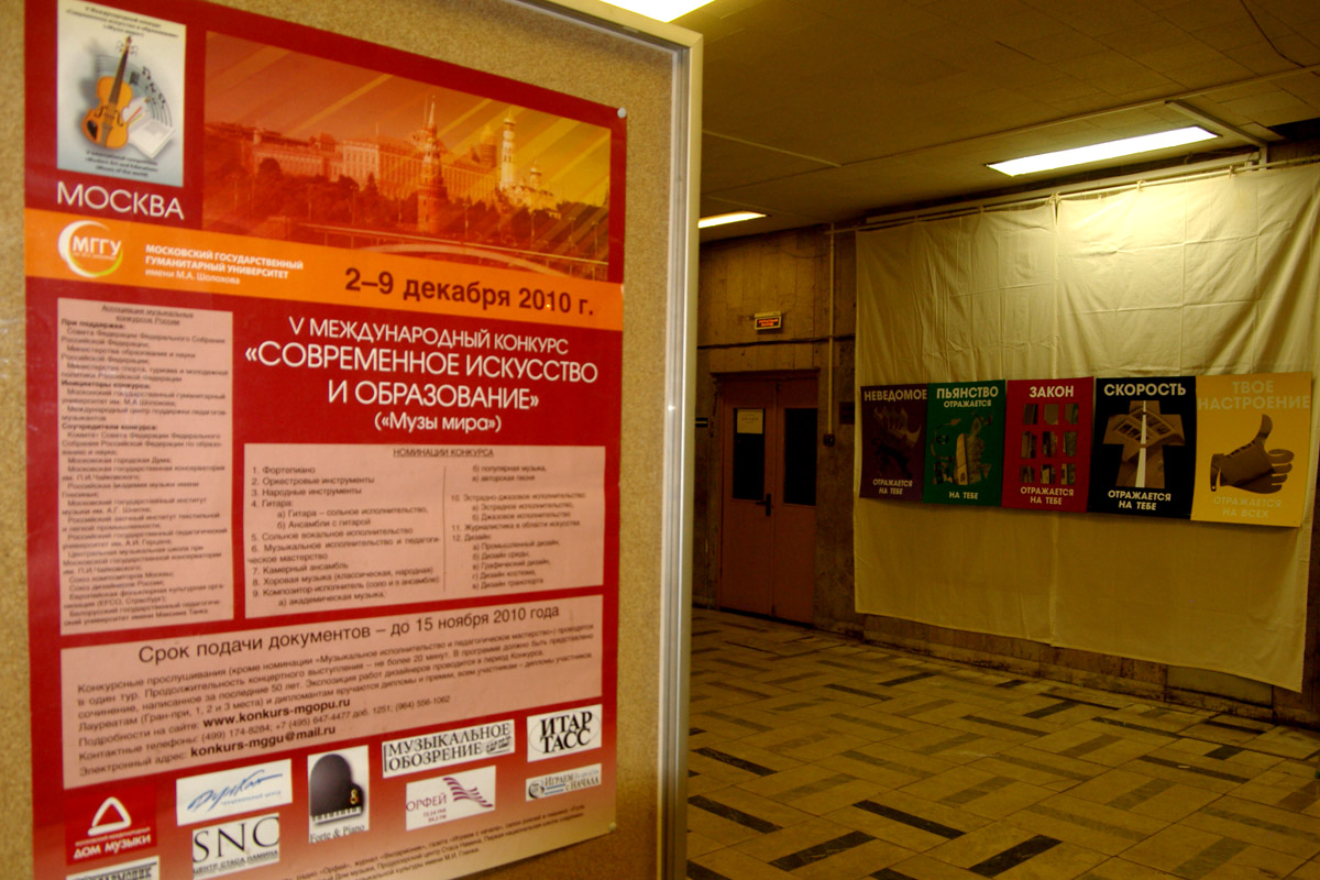 Конкурс «Музы мира» («Современное искусство и образование»)